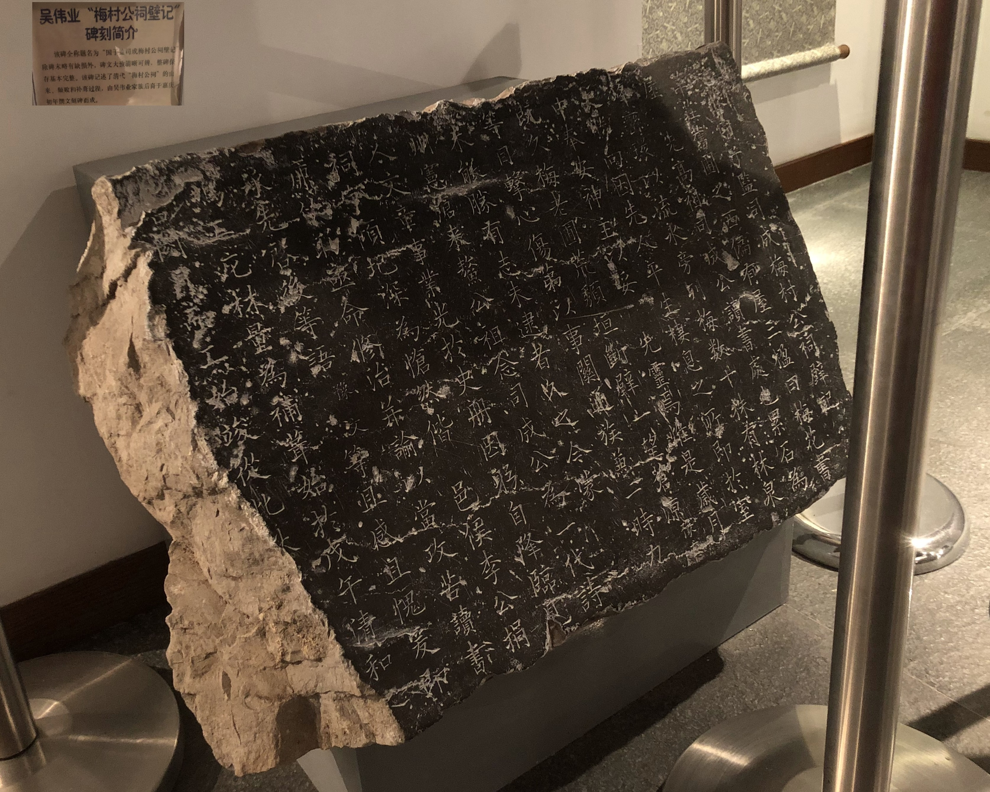 中文（中国大陆）: 梅村公祠壁记碑 清嘉庆 殷继山先生捐赠